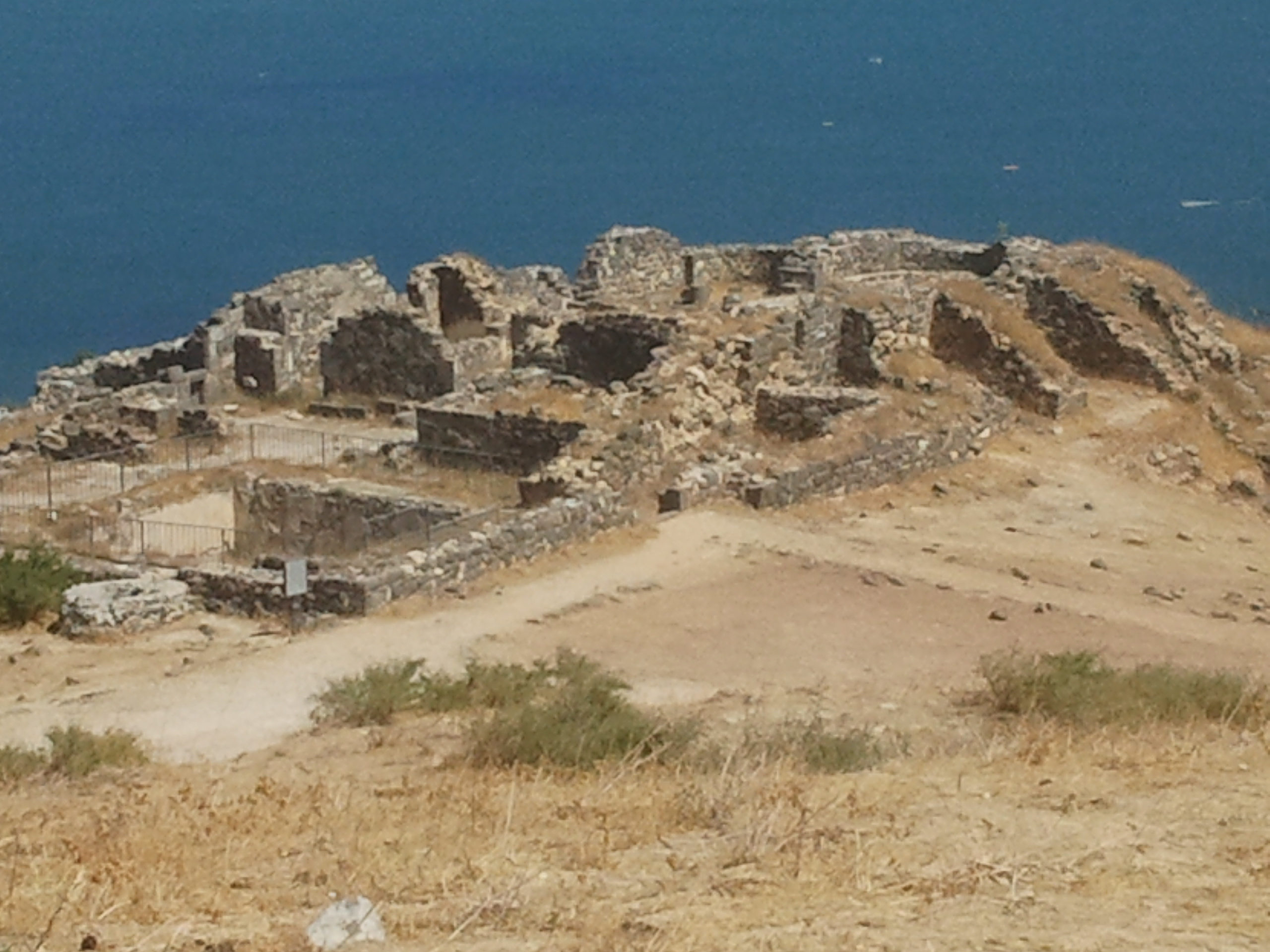 הר בֶּרֶנִיקי הוא הר בגליל, הנמצא סמוך לכנרת דרומית לטבריה. גובה ההר כ-190 מטר מעל פני הים. על ההר נמצאו שרידי כנסייה ביזנטית ולצידה מסגד מהמאה ה-8 לספירה.